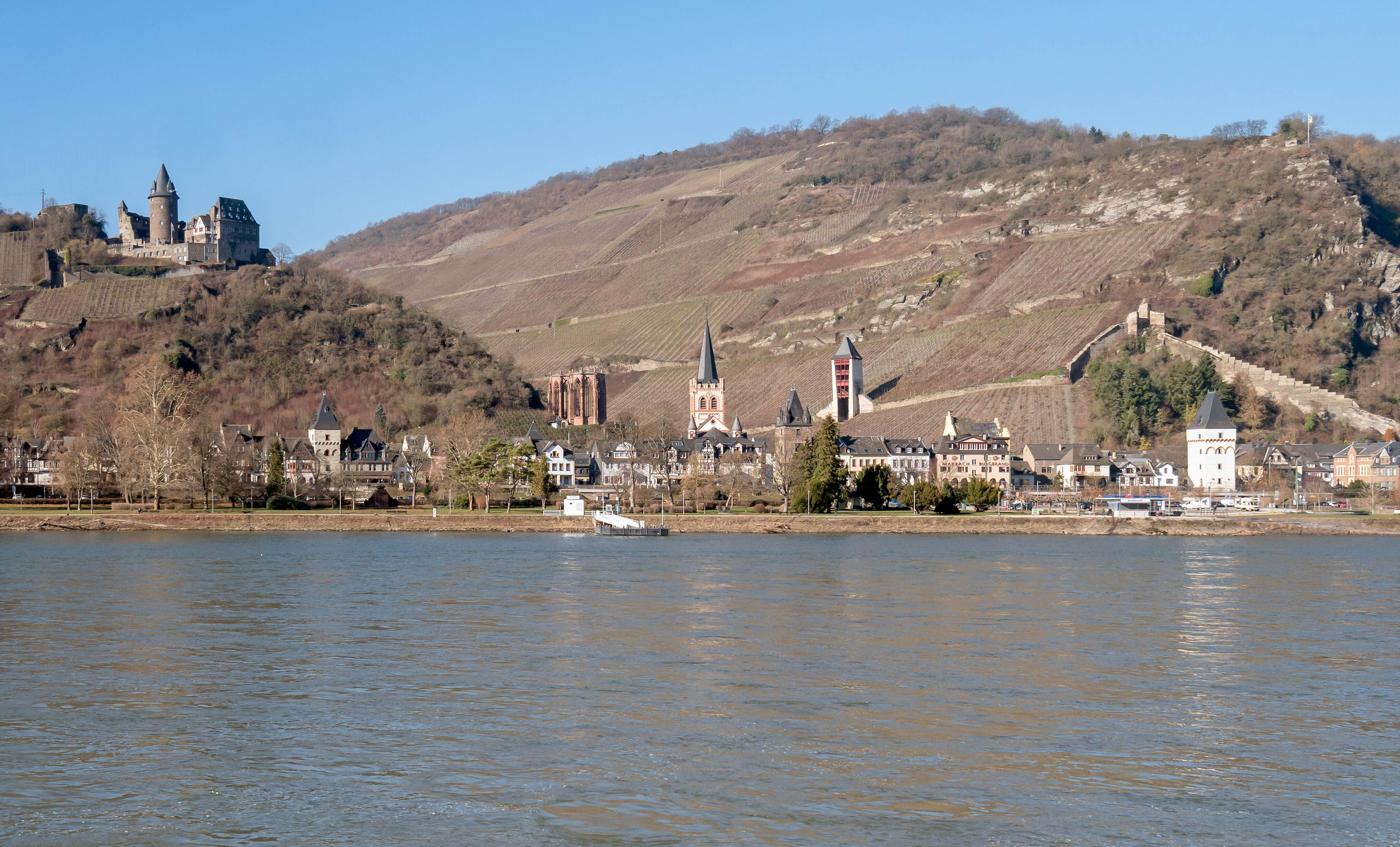 Panorama von Bacharach, Rheinseite